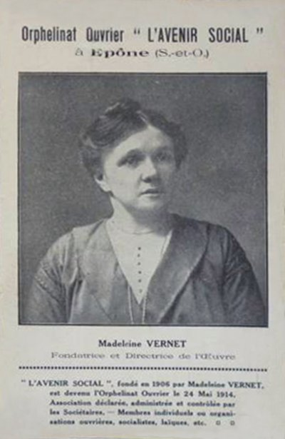 Carte postale de l’Orphelinat Ouvrier "L’Avenir Social" créé par Madeleine Vernet. Portrait de la fondatrice et directrice de cette Oeuvre.